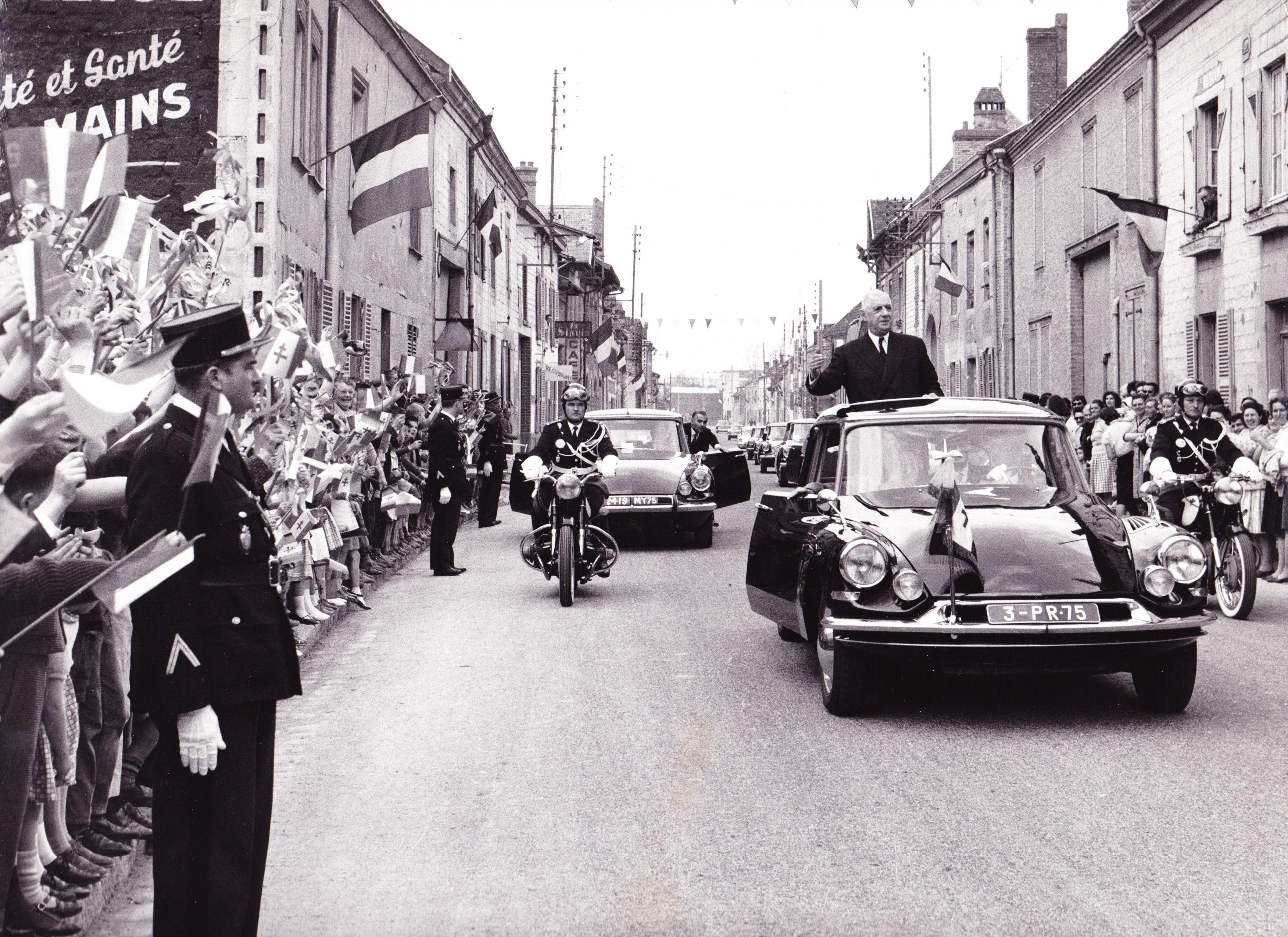 Le 22 avril 1963 vers 11h30, le président de la République française, le général Charles de Gaulle, au retour d'une visite dans les Ardennes, fait halte à Isles-sur-Suippe, village de la Marne.